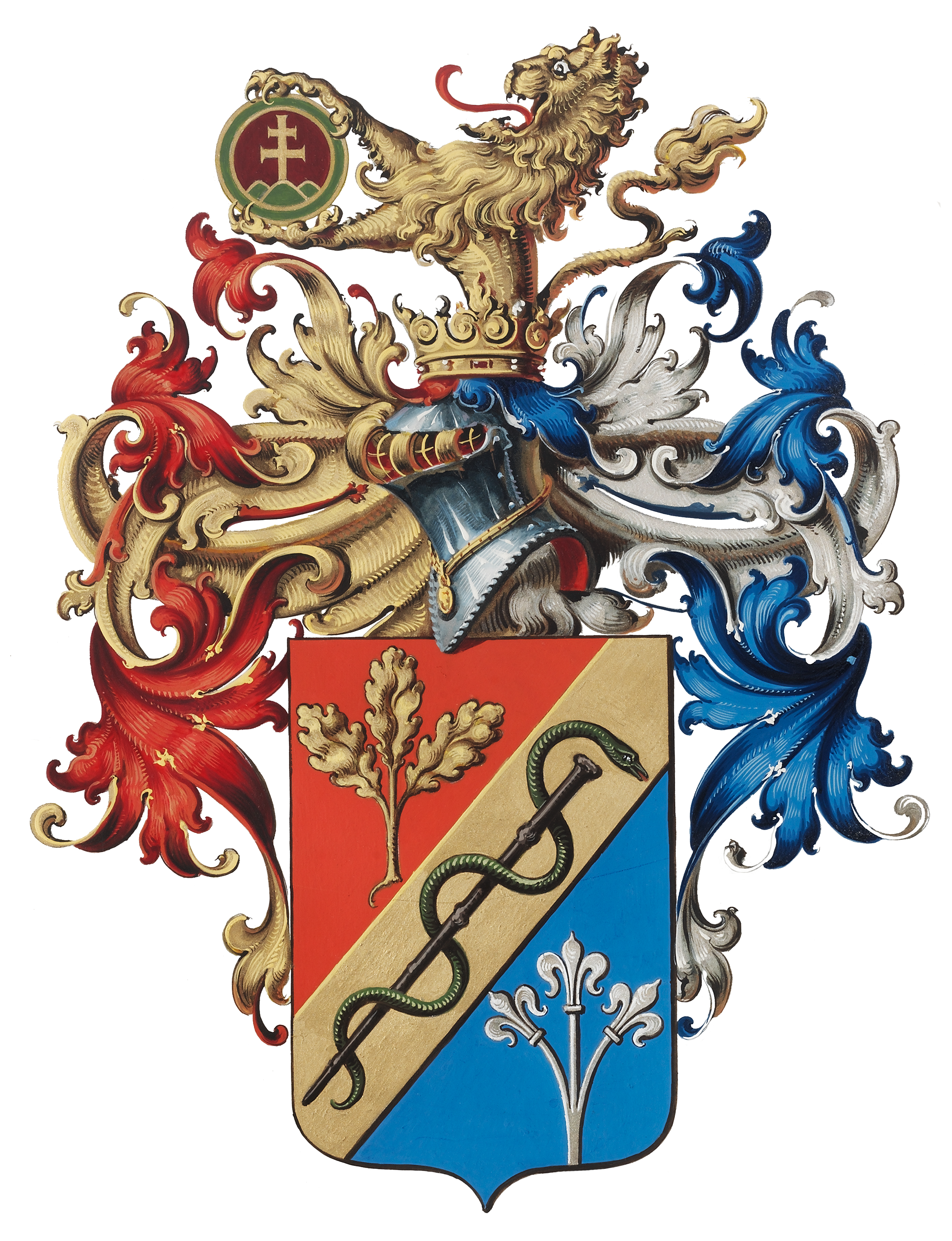 Ernst August Krahl (1858–1926) cs. kir. udvari címerfestő készítette.